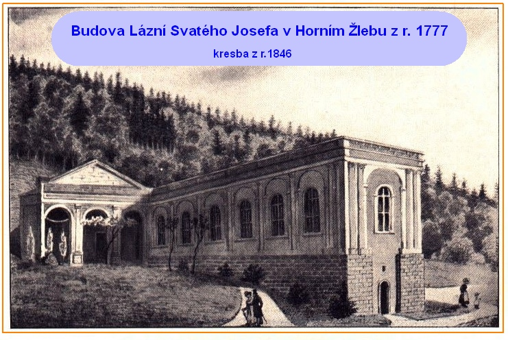 Stará pohlednice z r. 1846